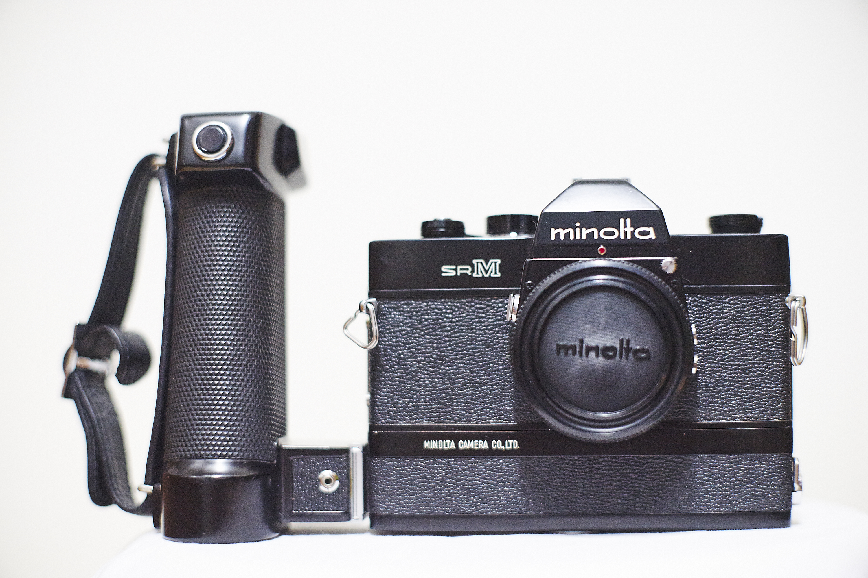 美樂達SR-M正面圖